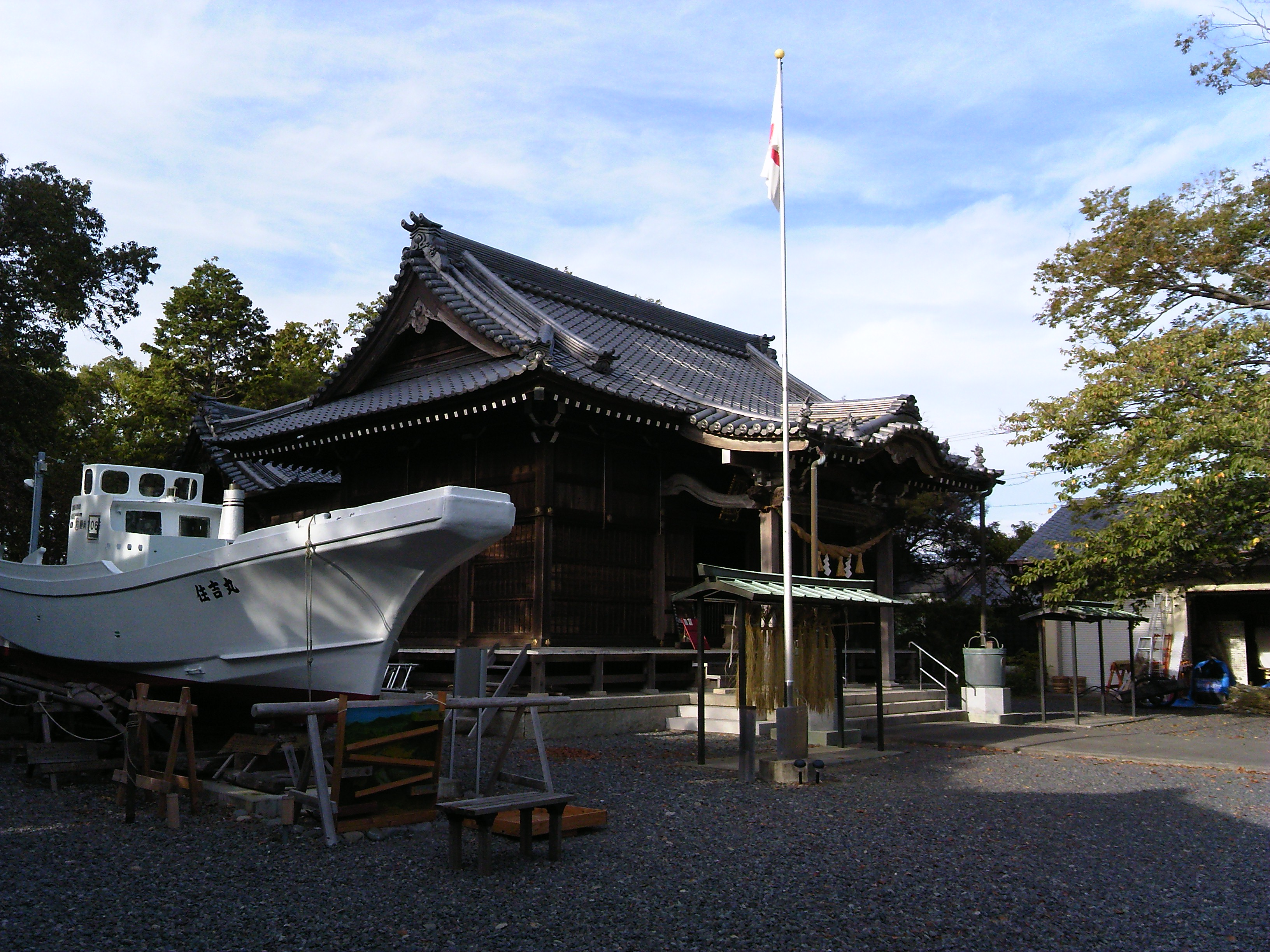 片岡神社（住吉神社）拝殿と住吉丸